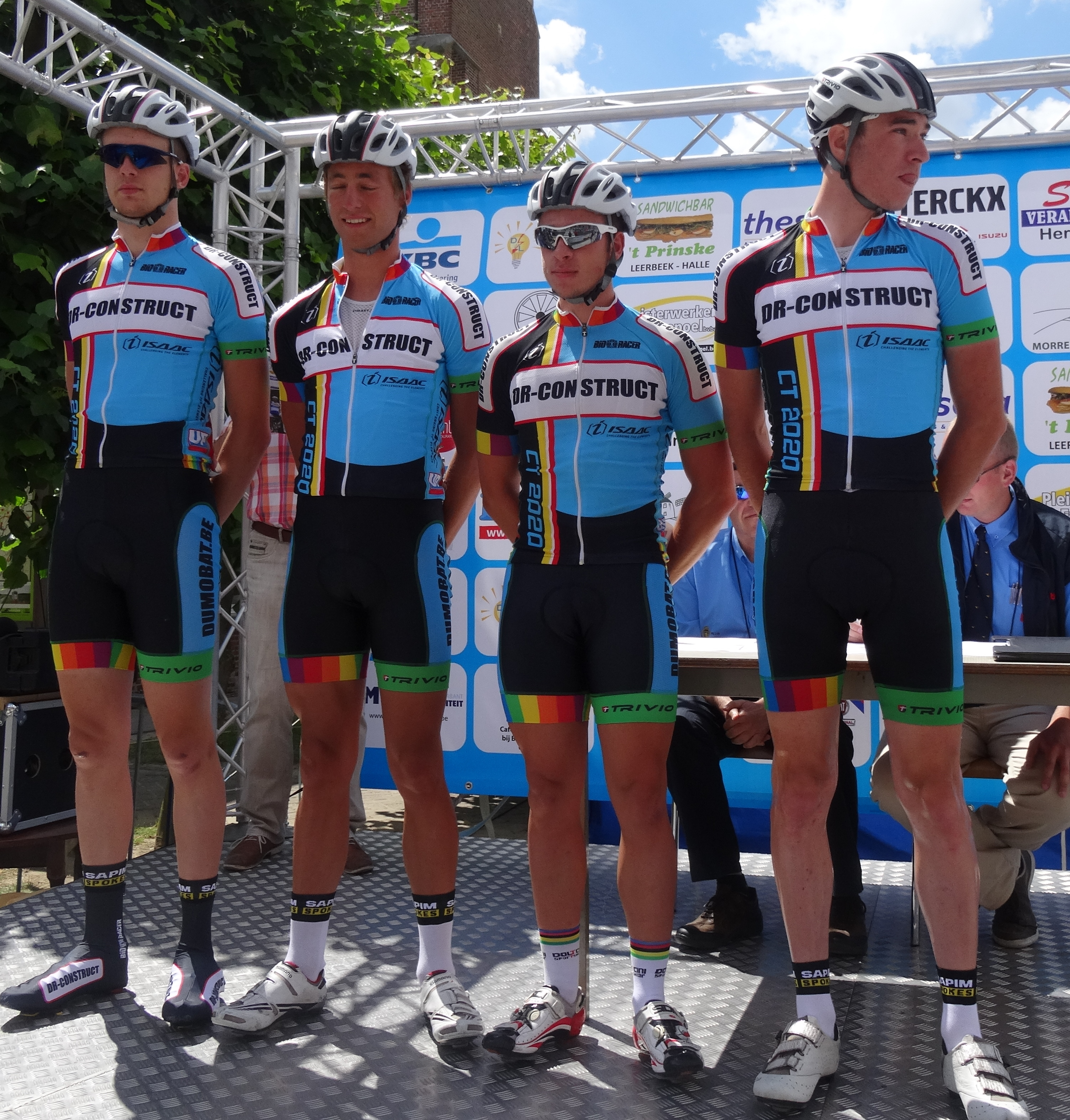 Reportage photographique réalisé le mercredi 25 juin à l'occasion du départ et de l'arrivée de l'Internationale Wielertrofee Jong Maar Moedig 2014 à Oetingen (Gooik), Belgique.